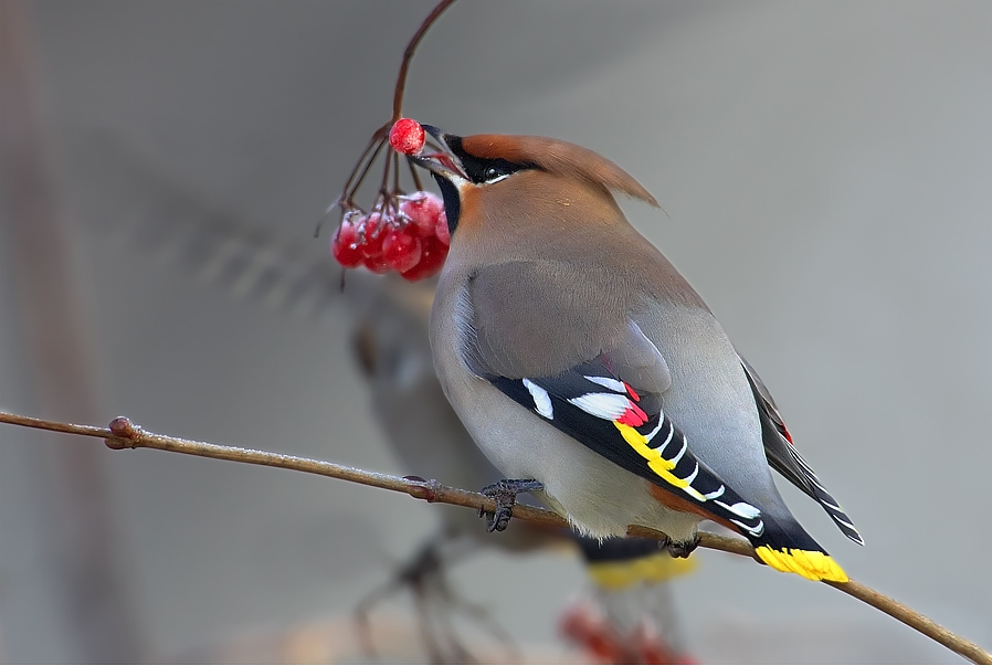 Bombycilla garrulus, Olomoucko, CZ